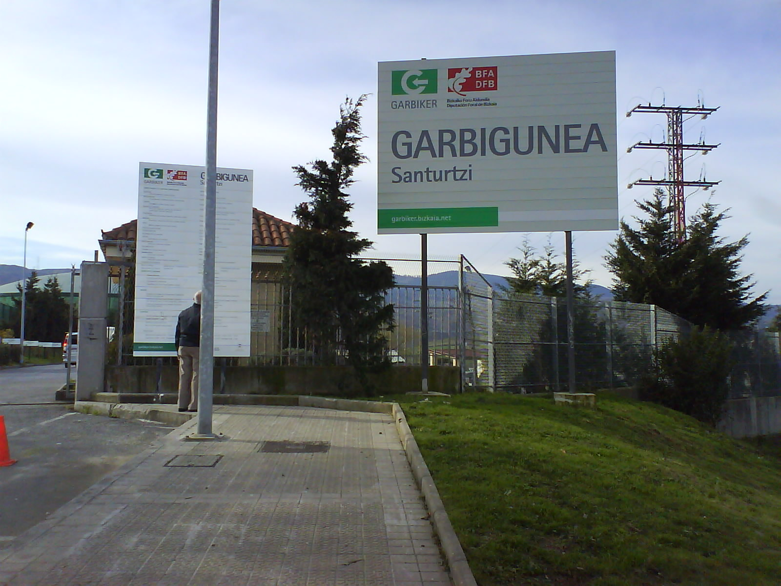 Santurtziko Garbigunea / Garbigune de Santurtzi